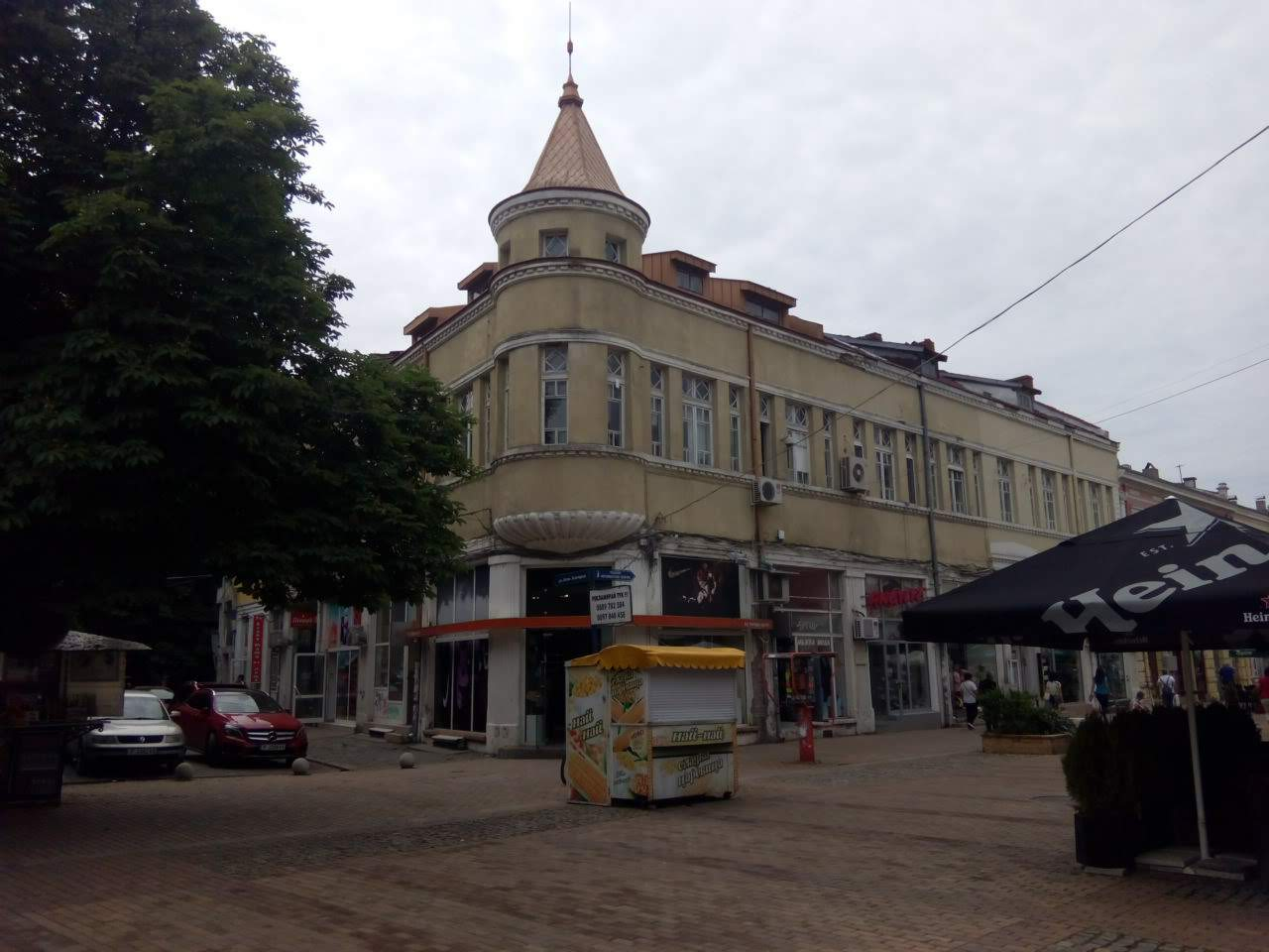 Къщата на Боздуганови